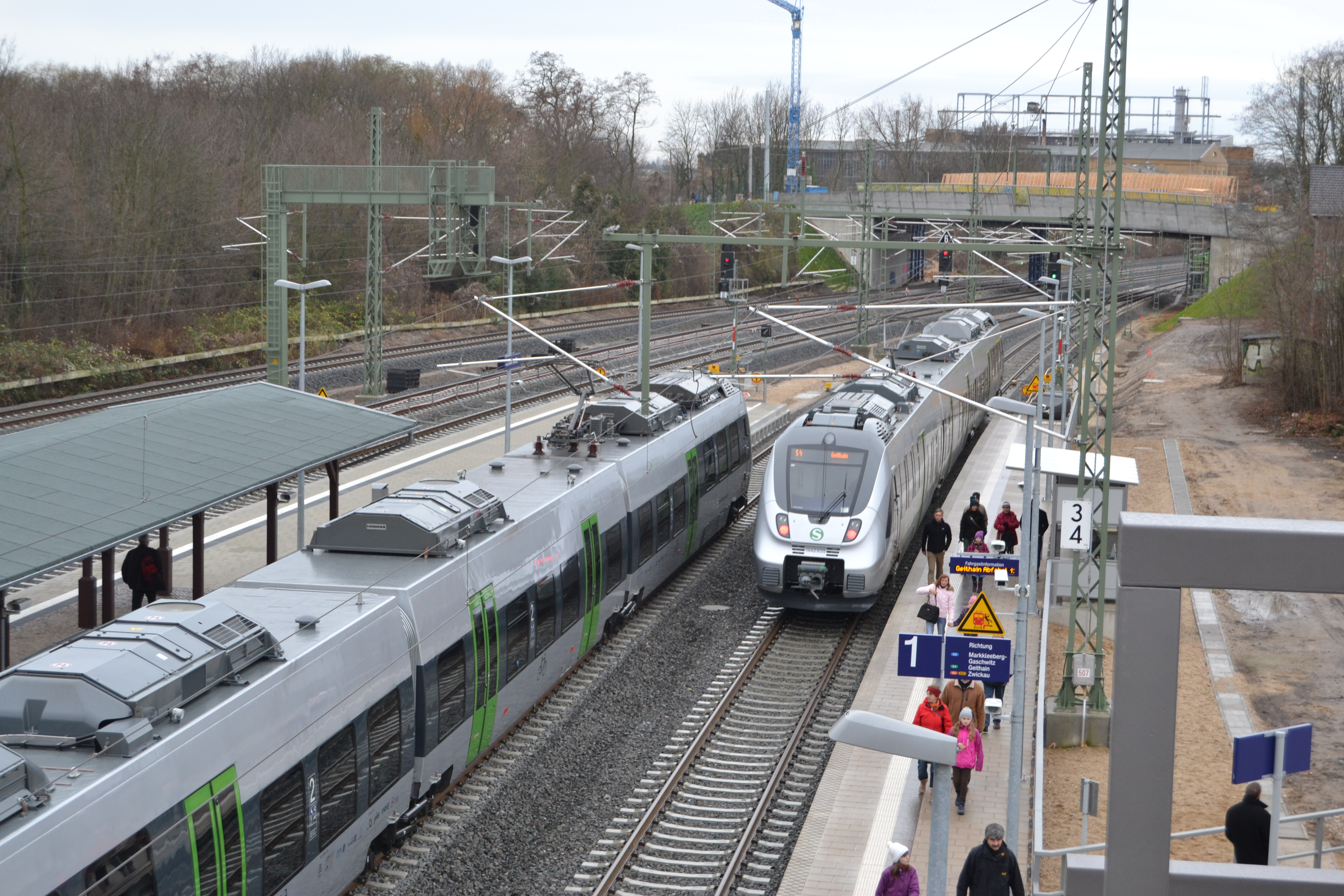 Bahnhof Leipzig-Connewitz